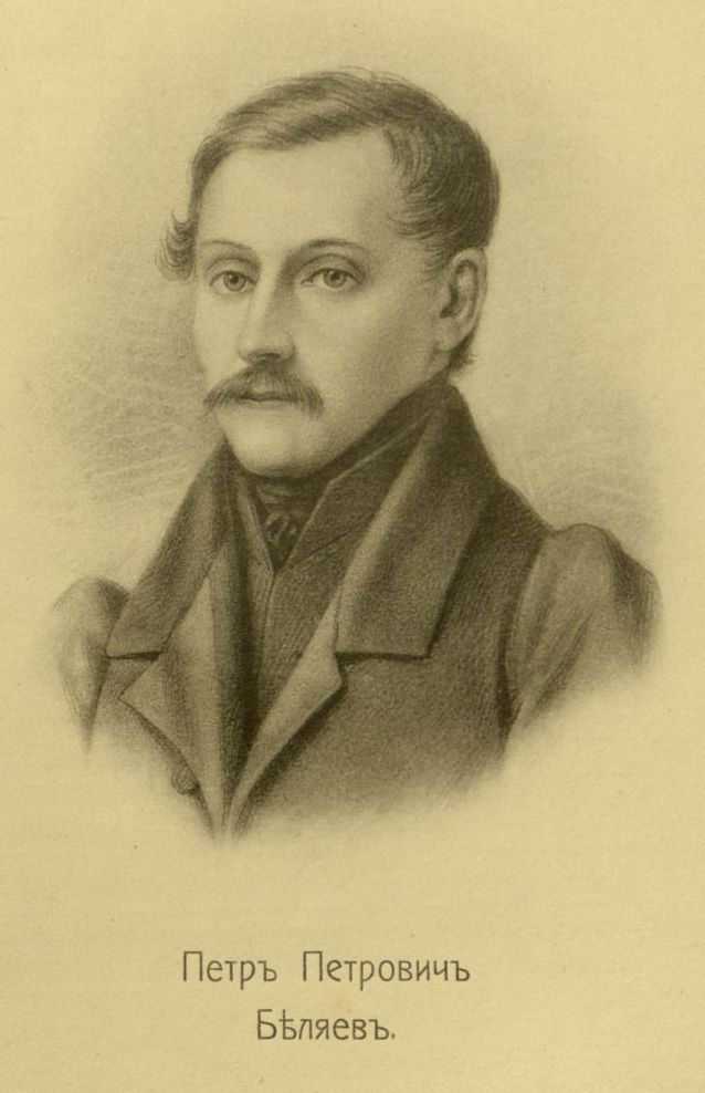 Головачев, П. М. Декабристы : 86 портретов, вид Петровского завода и 2 бытовых рисунка того времени. - М., [1906] Беляев, Пётр Петрович